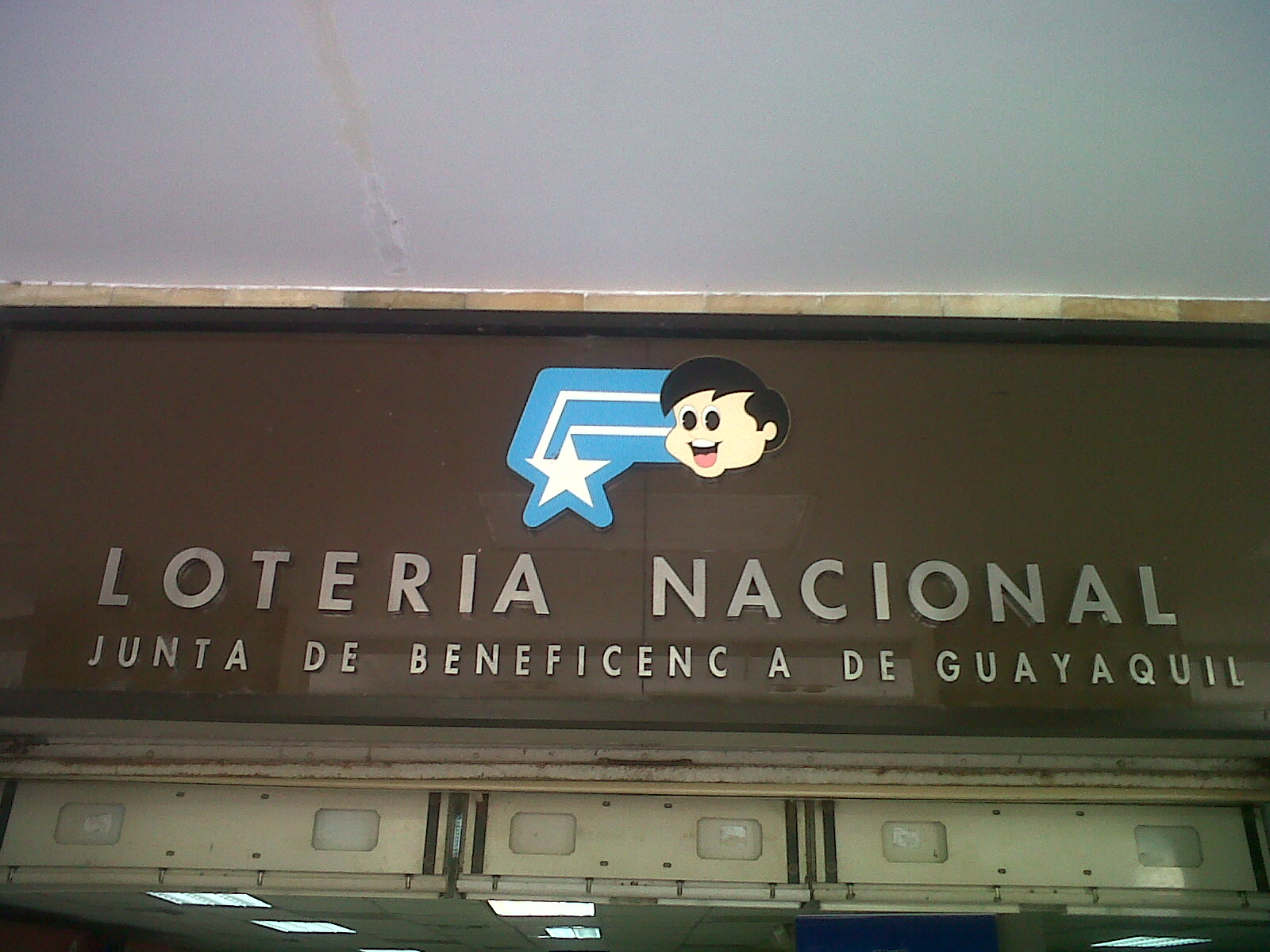 Logo de Lotería Nacional.